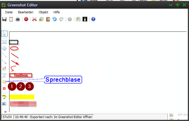 Von oben: Rechteck, Ellips, Linie, Pfeil, Freihand-zeichnung, Textbox, Sprechblase, Zaehler, Textmarker, Unerkenntlich Machen.